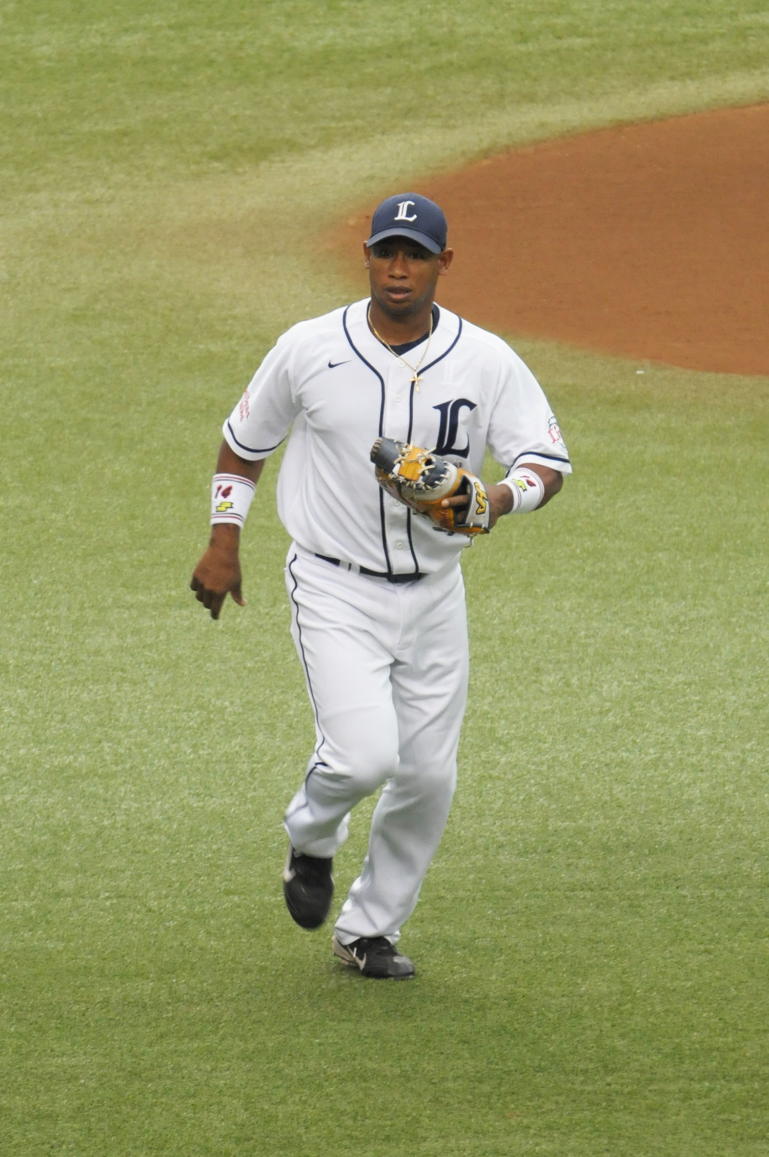 埼玉西武ライオンズ、ホセ・オーティズ選手。西武ドームで。